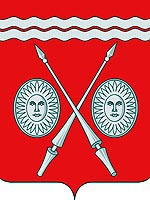 Герб Тетюшского района Татарстана